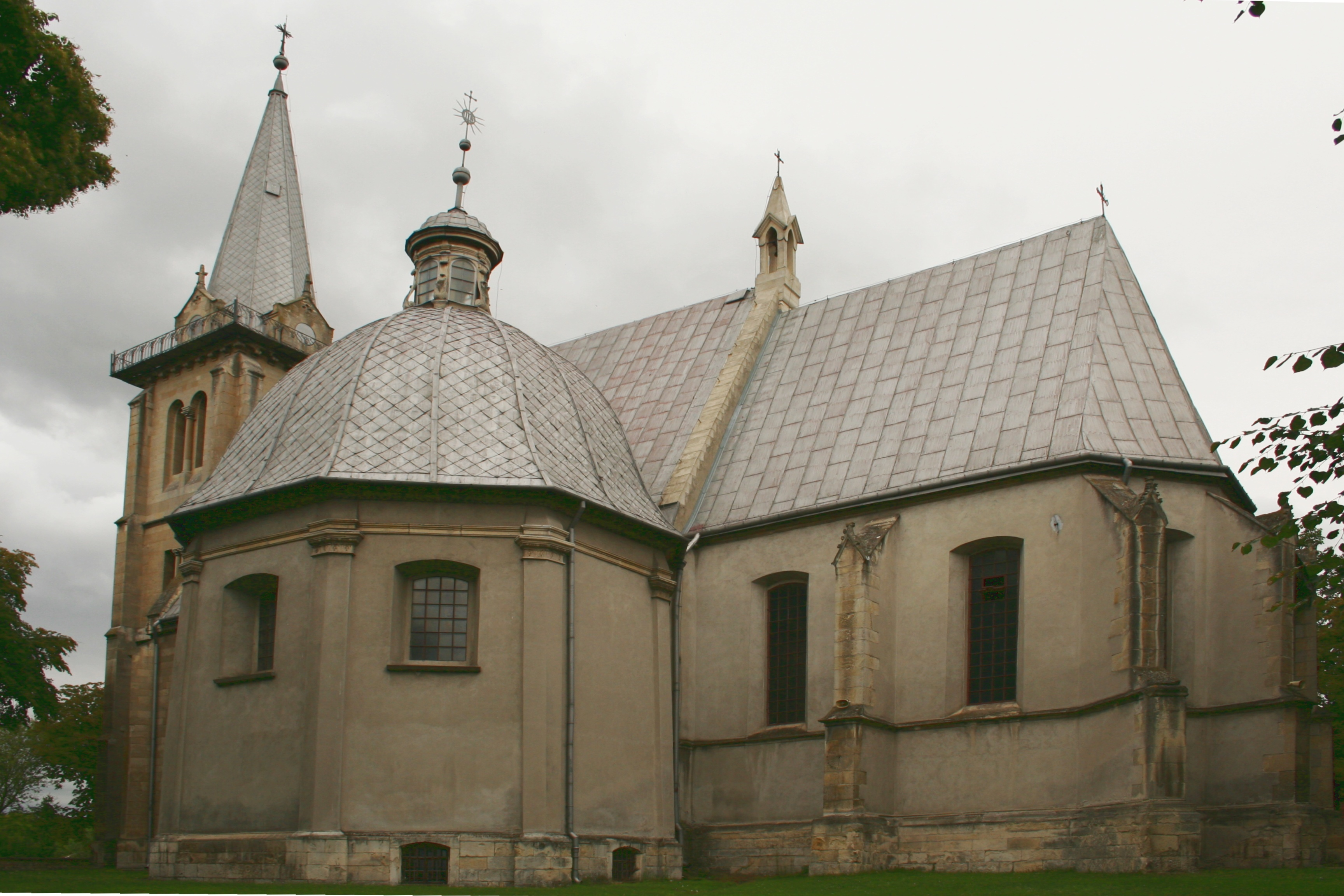 Działoszyce - kościół św. Trójcy